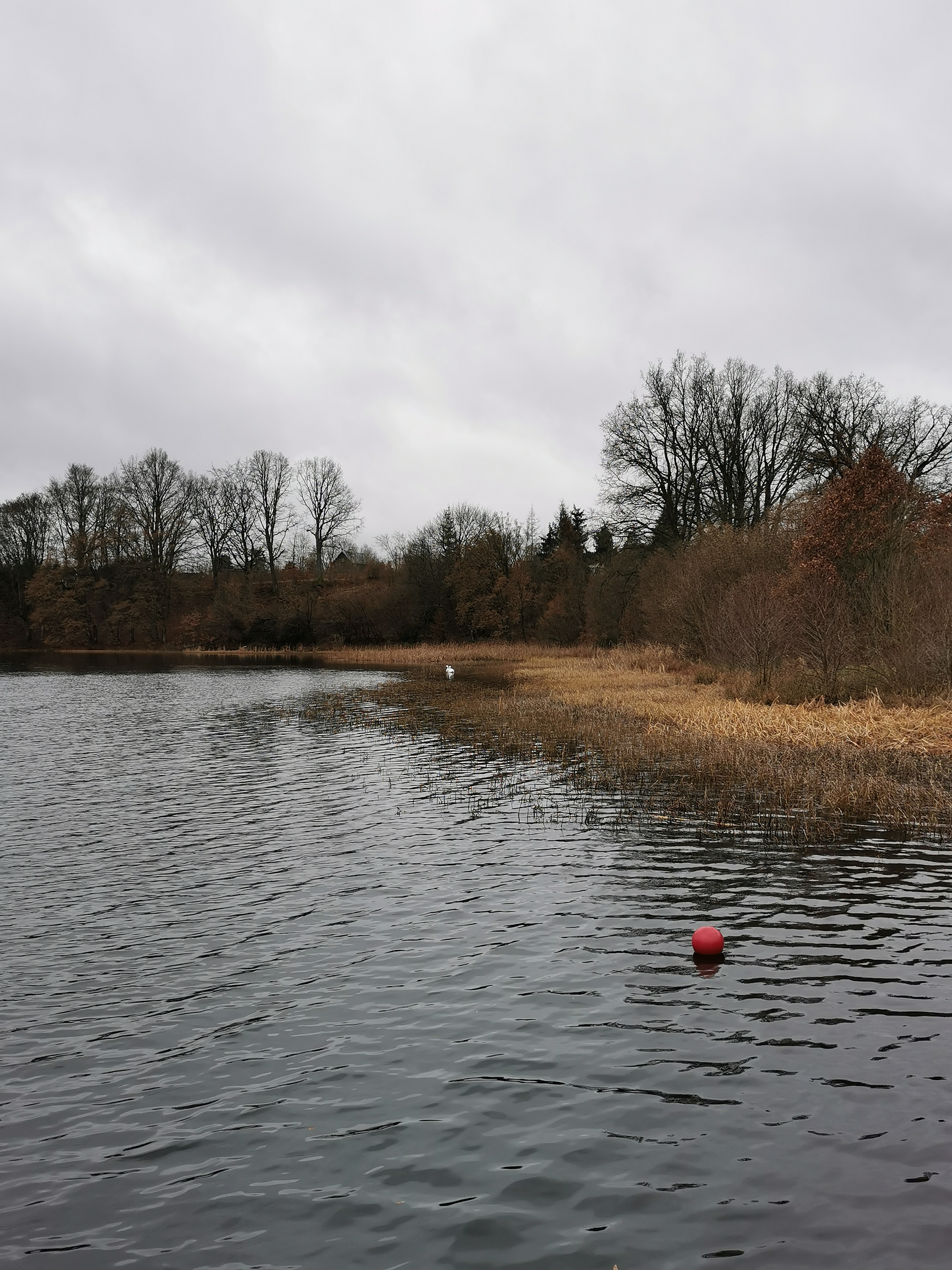 Jezioro Dobrskie na Wysoczyźnie Damnickiej